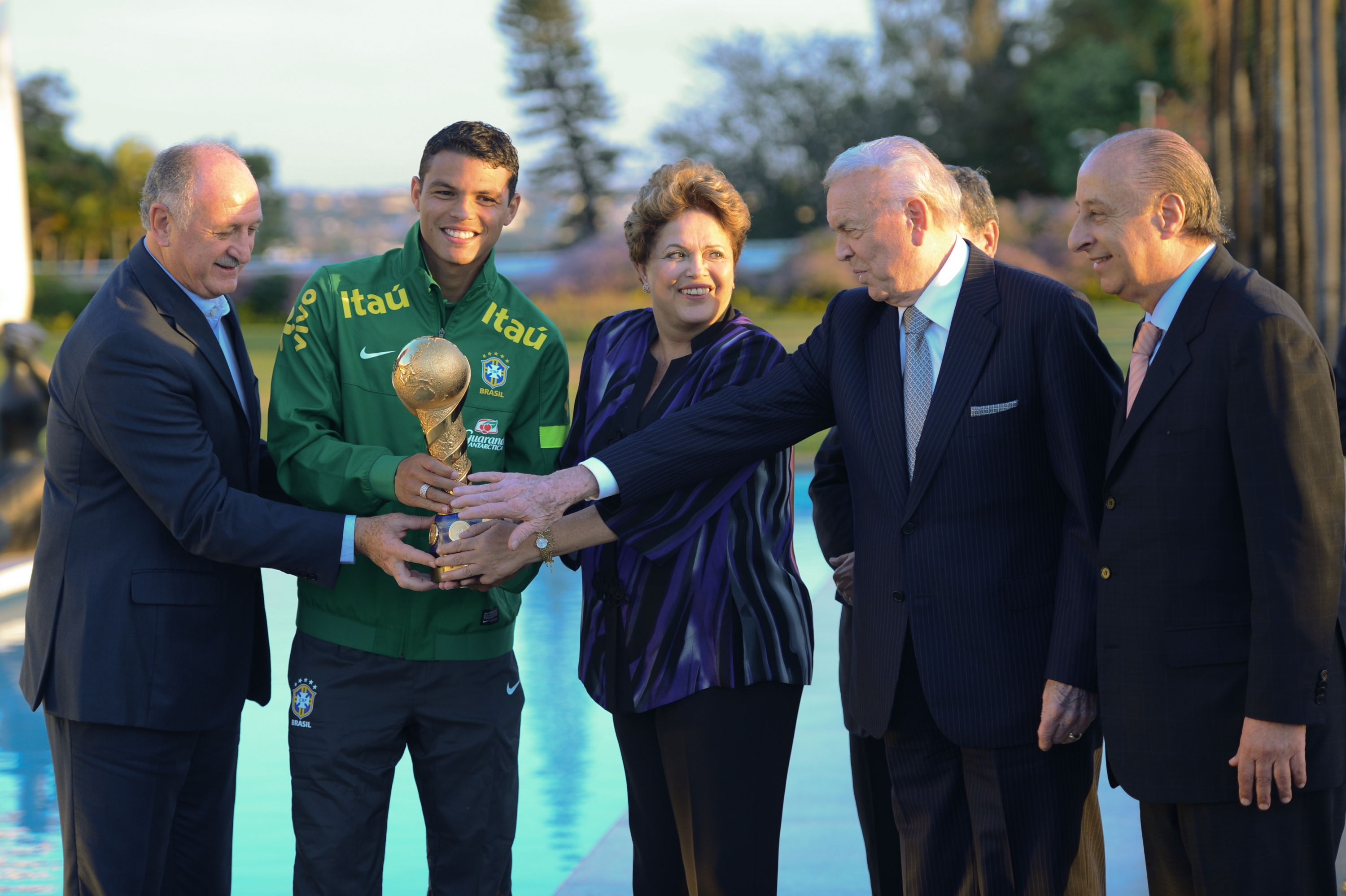 Presidenta Dilma Rousseff recebe Seleção Brasileira de Futebol